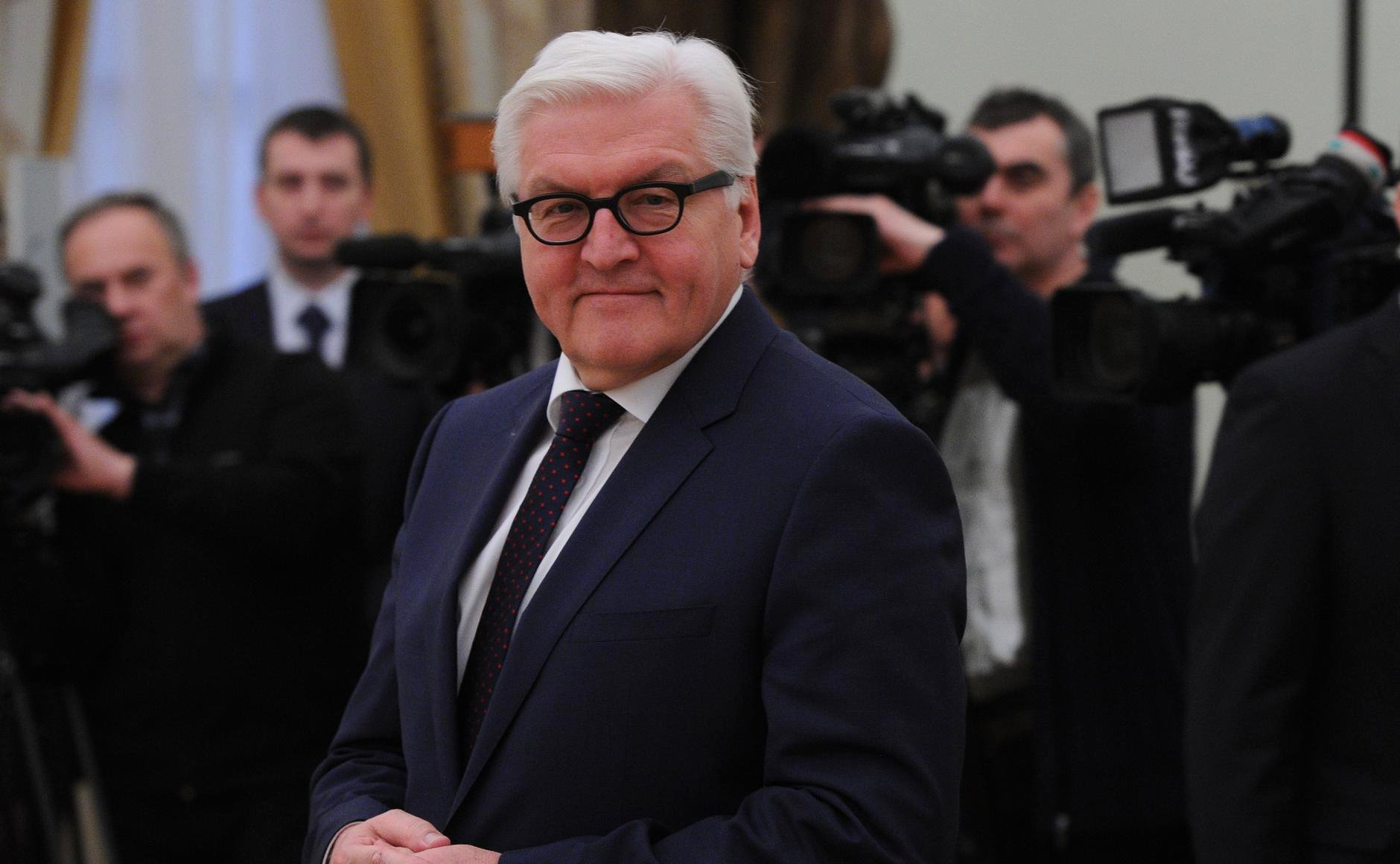 Министр иностранных дел Германии Франк-Вальтер Штайнмайер перед встречей с Президентом России Владимиром Путиным